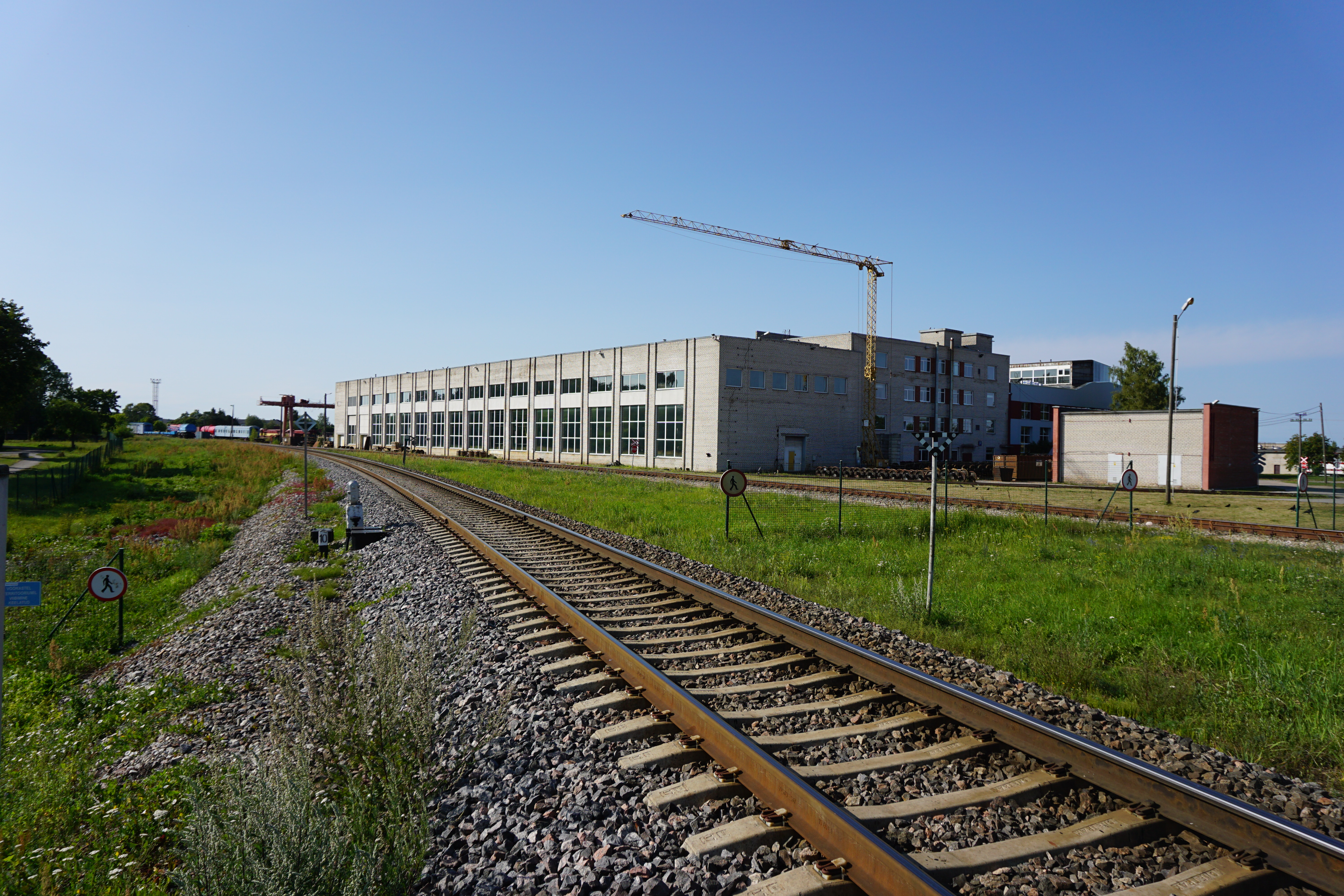 Tapa depoo